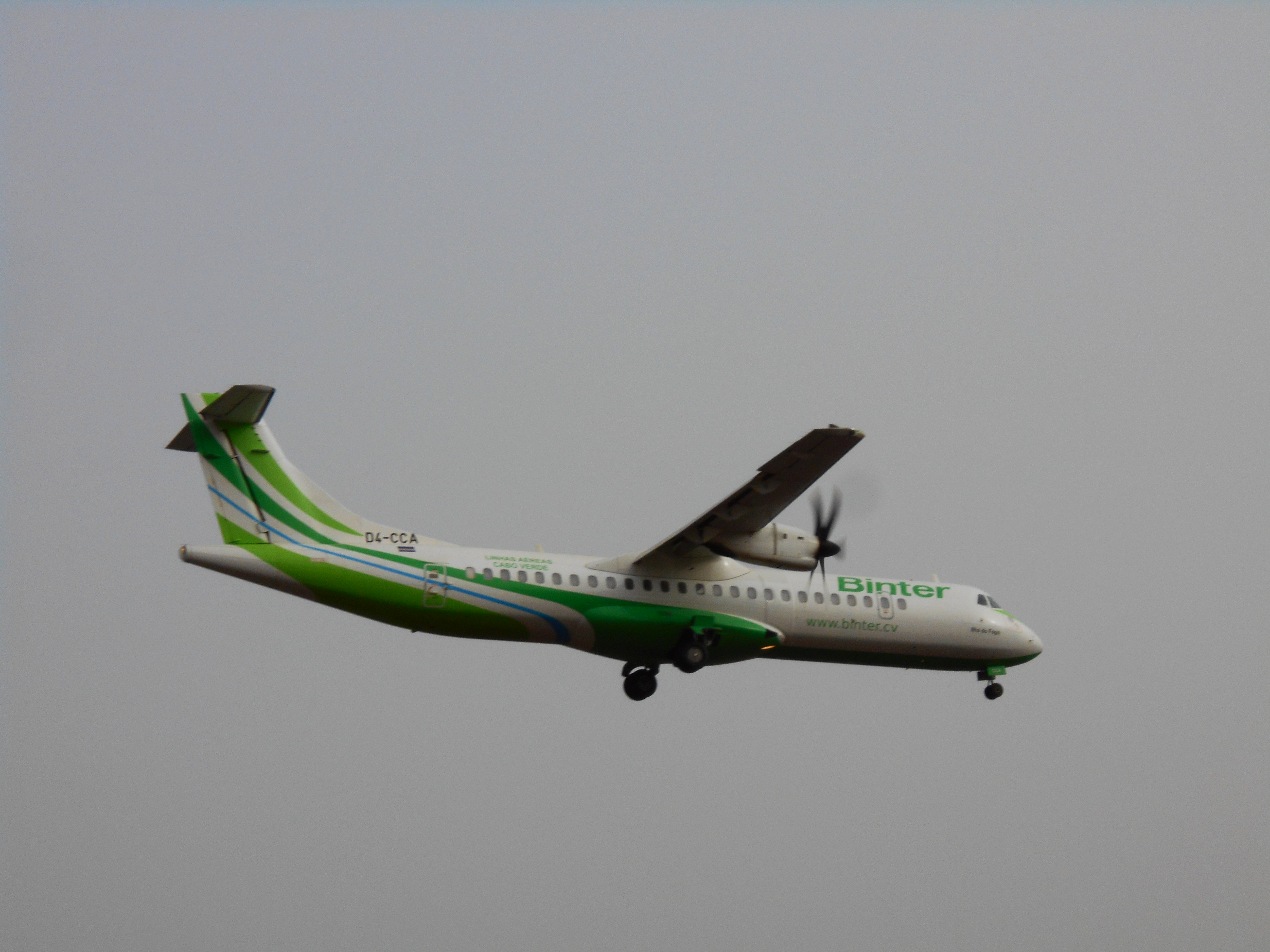 Binter CV aterrando a VXE D4-CCA